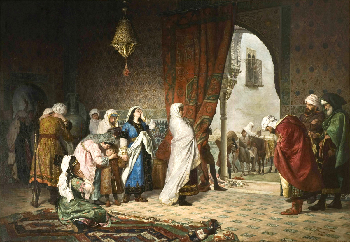 La obra representa el momento en que Boadbil (1459-1533), el último rey musulmán de Granada, abandonó el palacio de la Alhambra junto con su familia después de que los Reyes Católicos tomaran Granada en 1492.